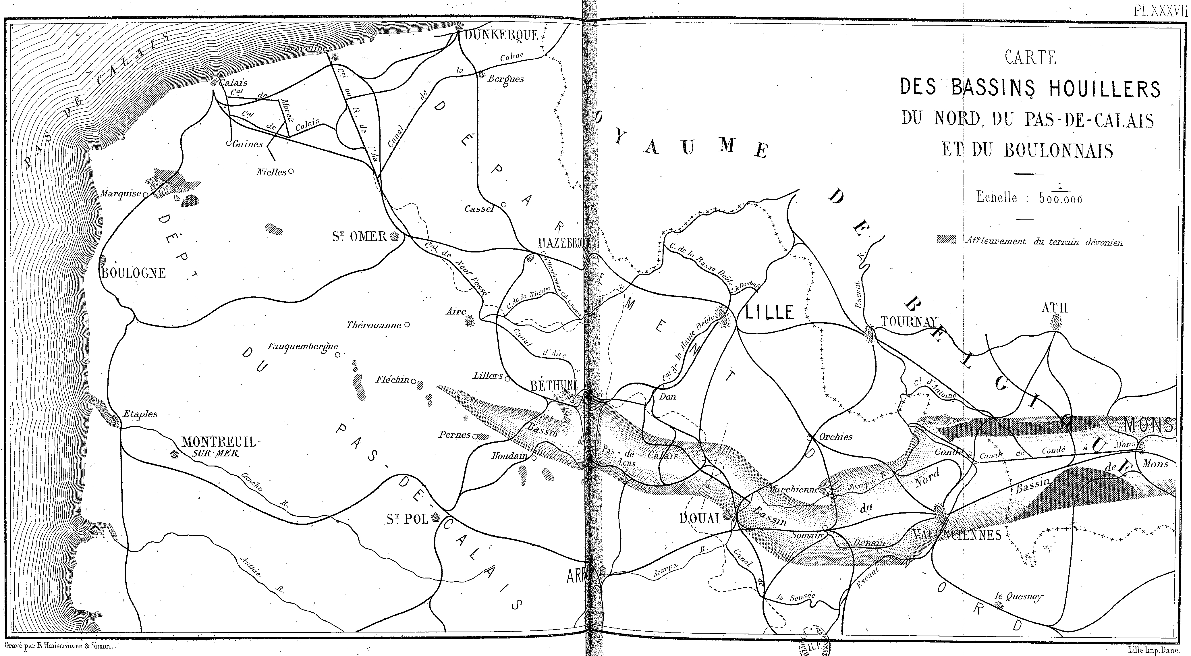 Carte des bassins houillers du Nord, du Pas-de-Calais et du Boulonnais vers 1880.